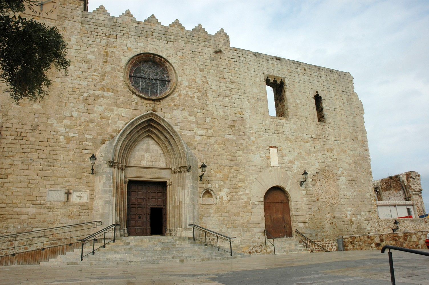 Palau vescomtal, Blanes, Girona, (Catalunya).